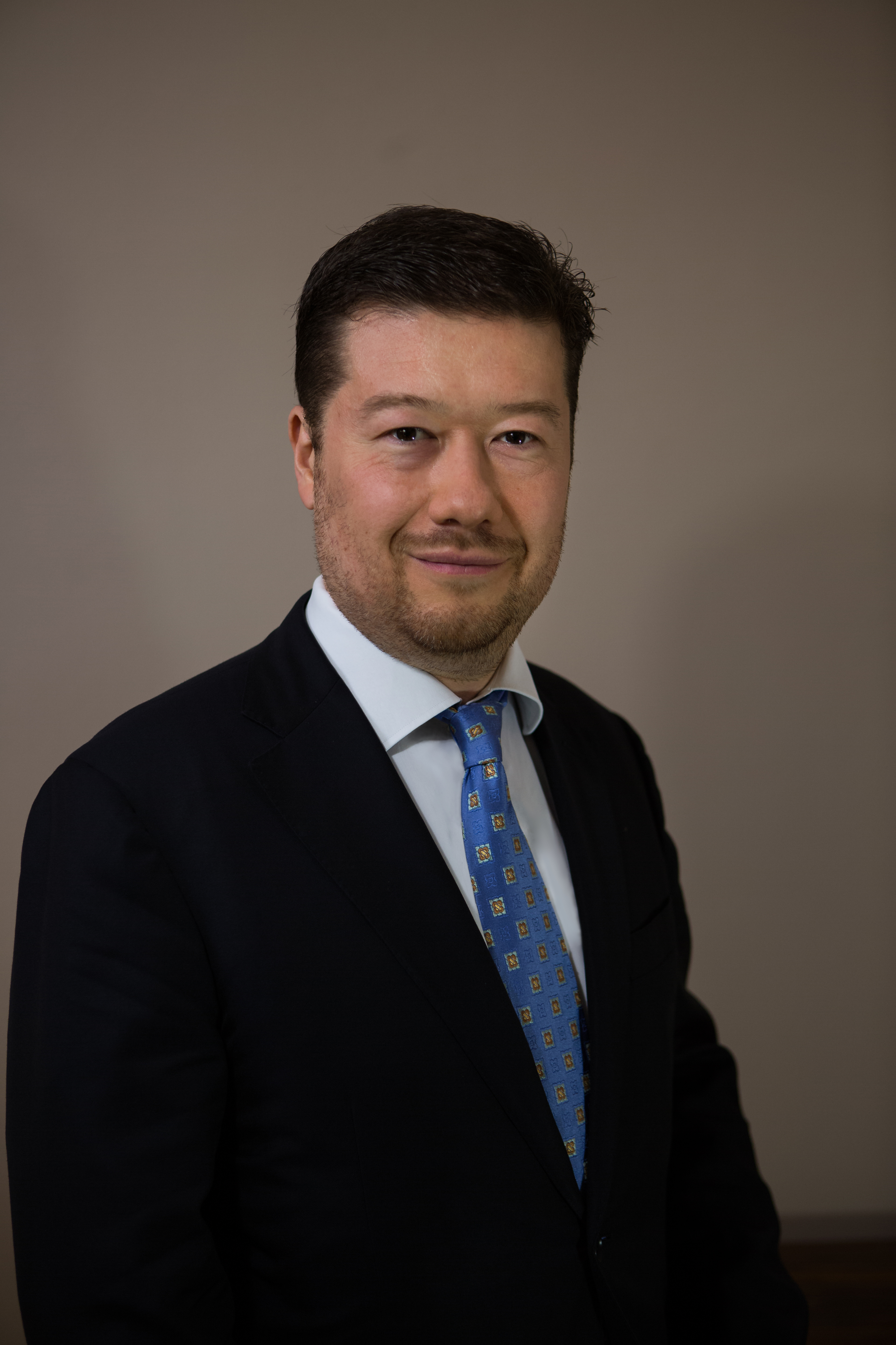 Tomio Okamura